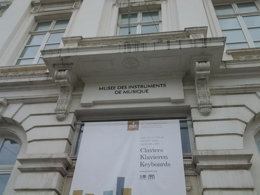 Cartouche surmontant les doubles portes de gauche donnant sur la Place Royale